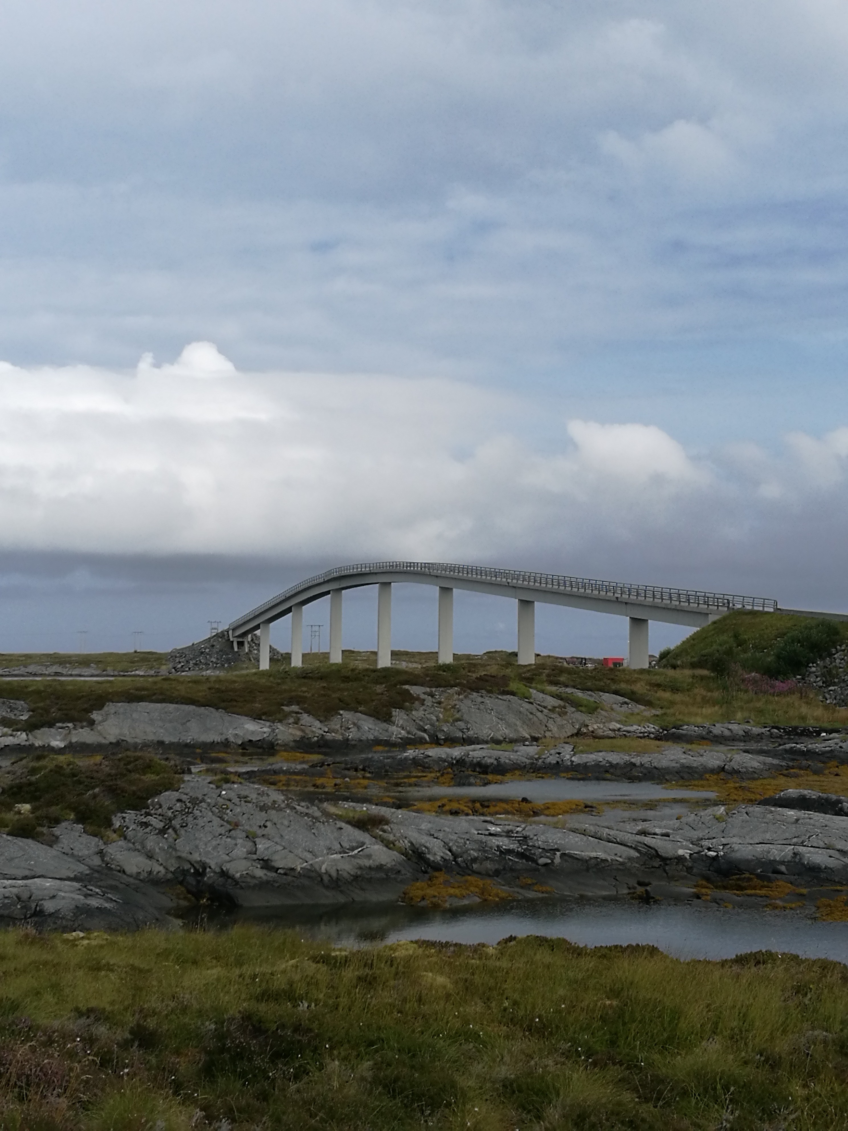 Verjeskiftbrua (256 meter) på Smøla mellom Kråkøya og Flatøya ut mot Veiholmen, Fylkesvei 669.